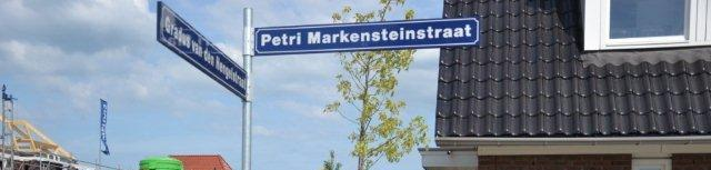 Foto juni 2011